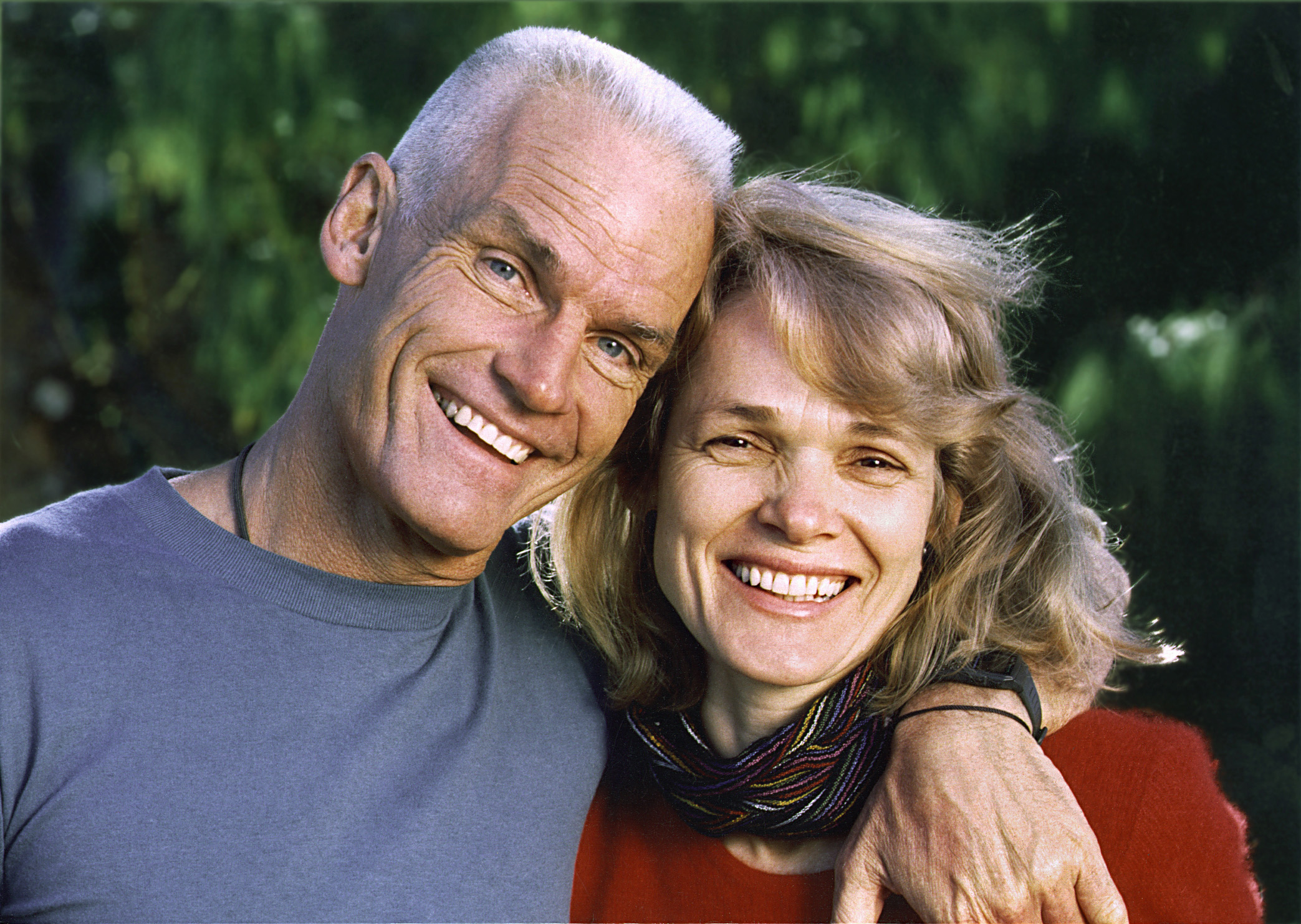 Hanna Nydahl und ihr Ehemann Ole Nydahl.